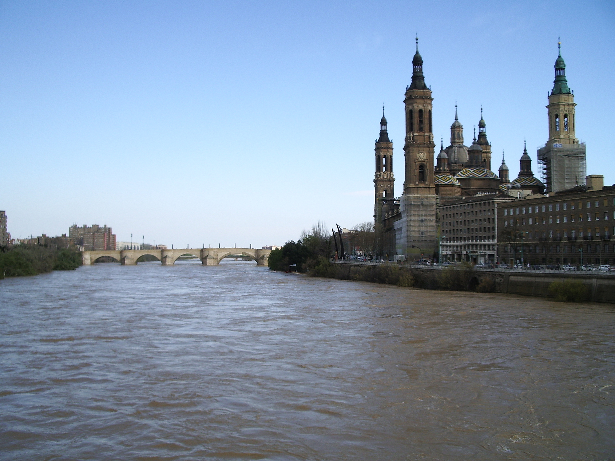 Crecida del Ebro del 4 de abril de 2007